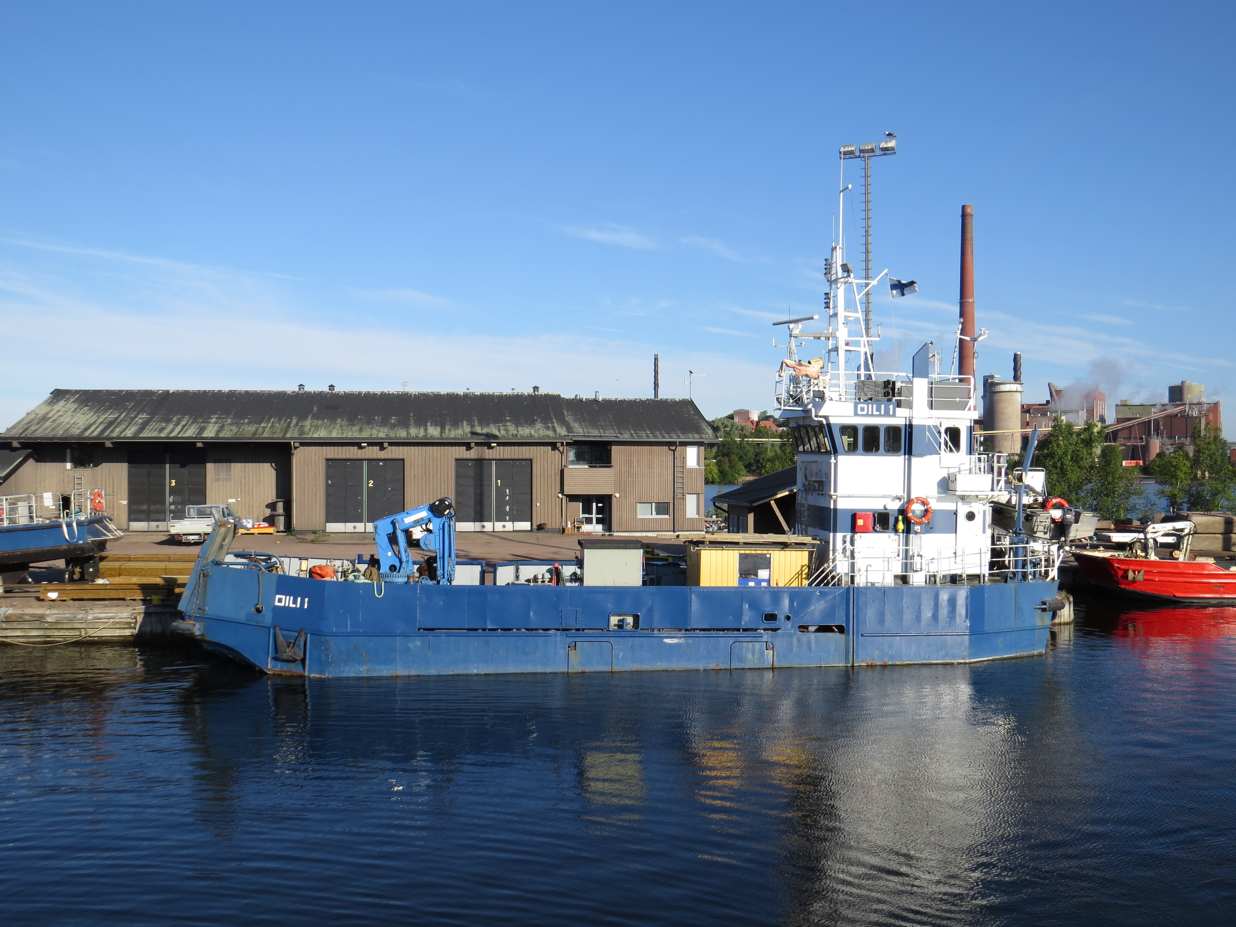 Meritaito Oy:lle kuuluva Oili-luokan väyläalus Kotkassa Kuusisen satamassa.